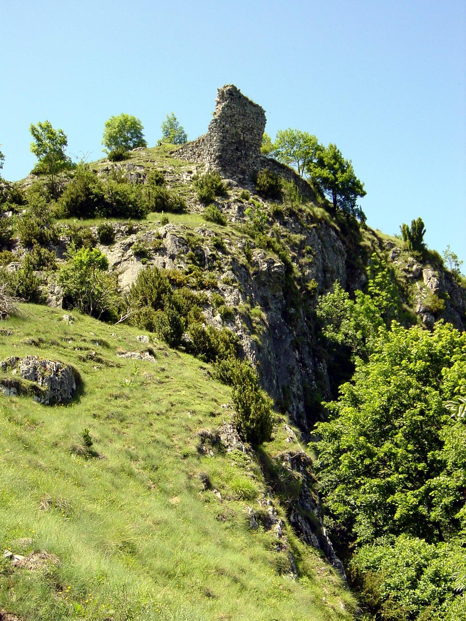 La tour du Campanal de Montréal-de-Sos